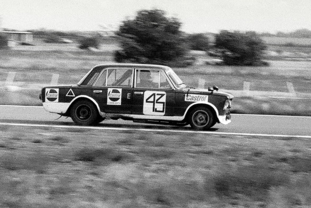 Tor "Poznań". Edward Kinderman z Automobilklubu Śląskiego za kierownicą Polskiego Fiata 125p Akropolis 1800.